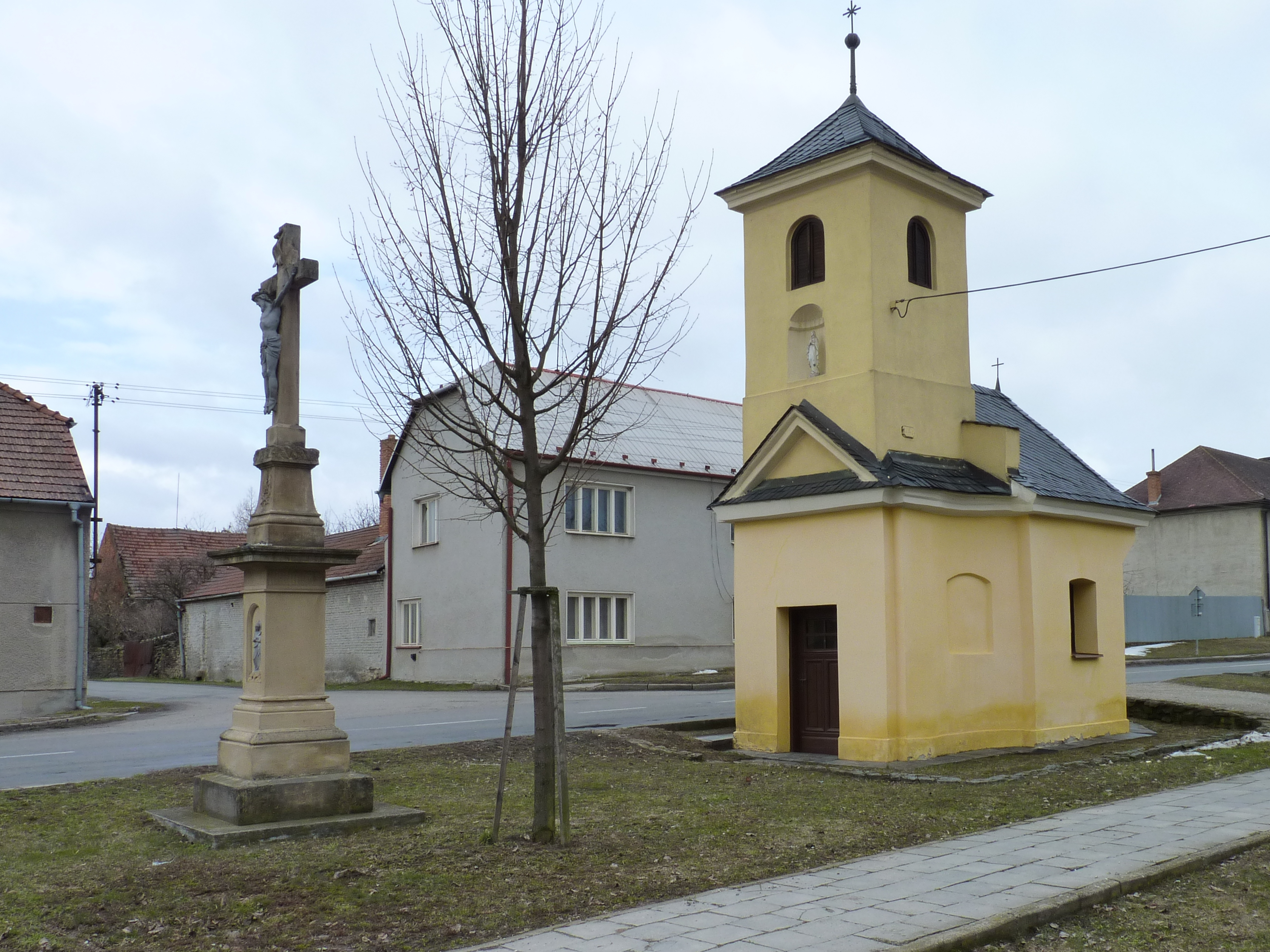 Kaplička P. Marie (Hluchov), křižovatka silnic Kostelec - Přemyslovice - Zdětín, Hluchov